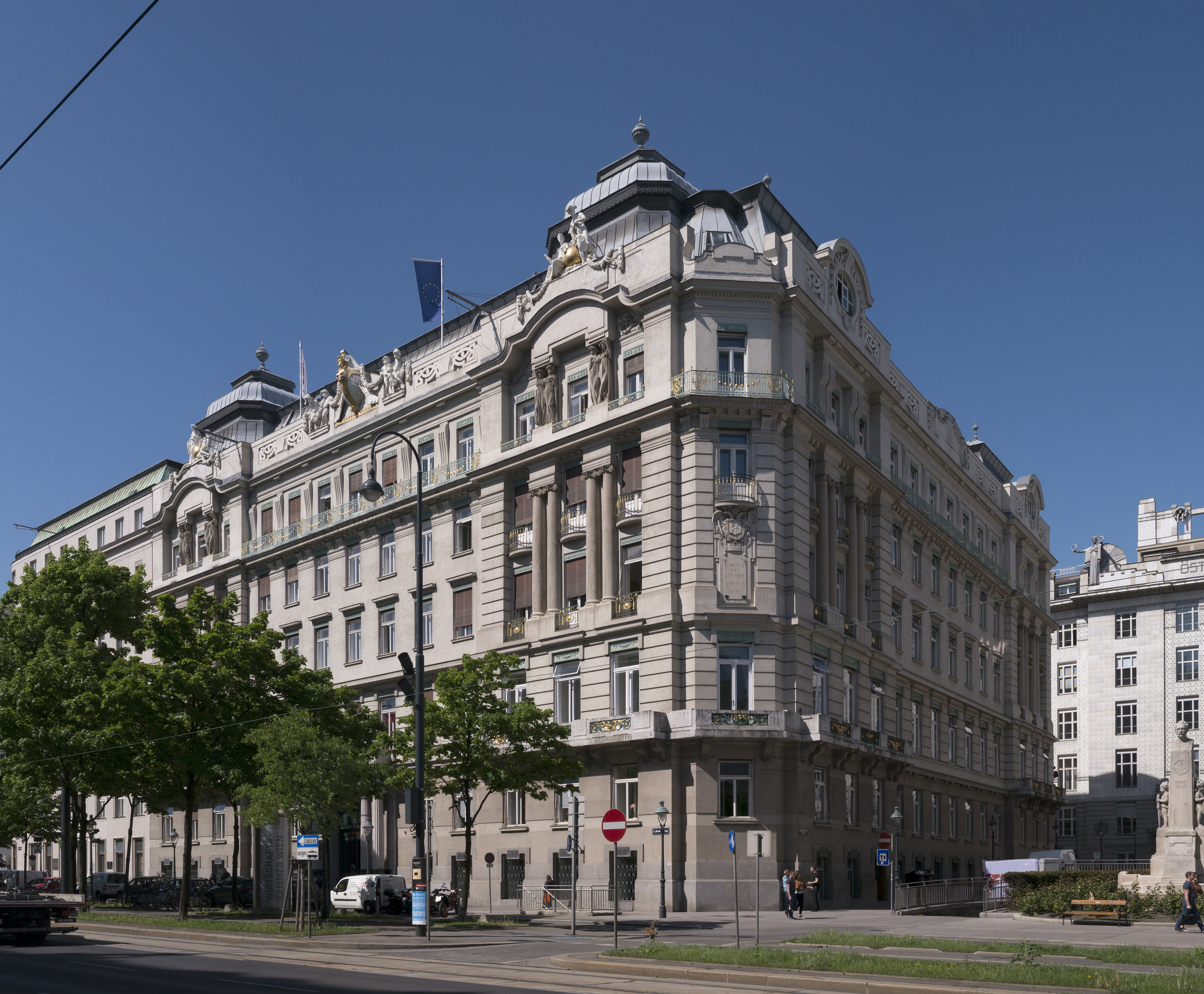 Bundeskammer der gewerbl. Wirtschaft, ehem. Kammer f. Handel, Gewerbe u. Industrie